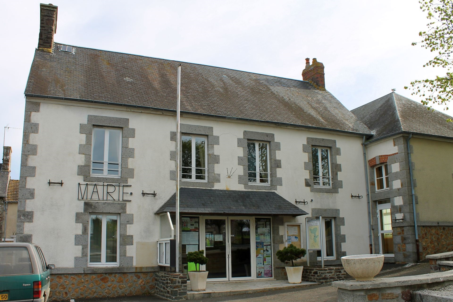 Mairie de Saint-Jean-des-Champs